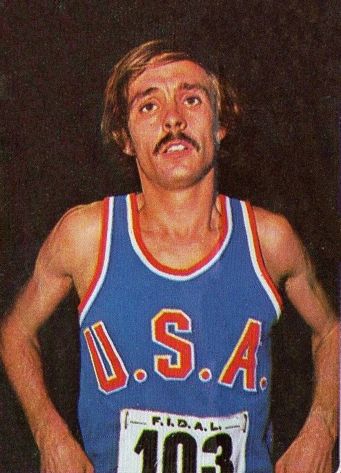 CAMPIONI dello SPORT 1973/74-Figurina n.9- WOHLHUTER - USA -ATL.LEGGERA